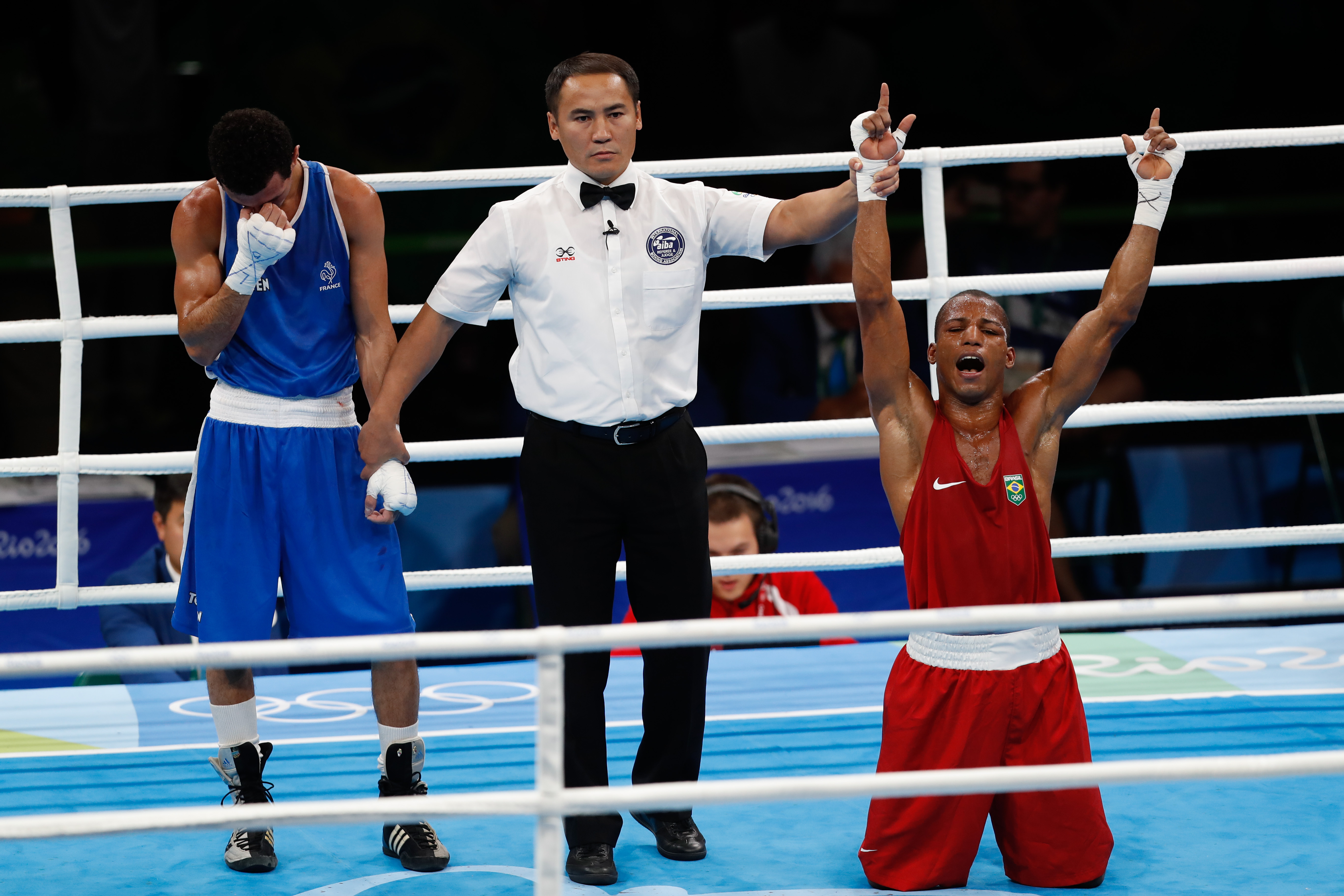 Rio de Janeiro - Por decisão unânime dos juízes, o lutador brasileiro Robson Conceição derrotou o francês Sofiane Oumiha e garantiu o ouro na categoria peso ligeiro, até 60 quilos (Fernando Frazão/Agência Brasil)